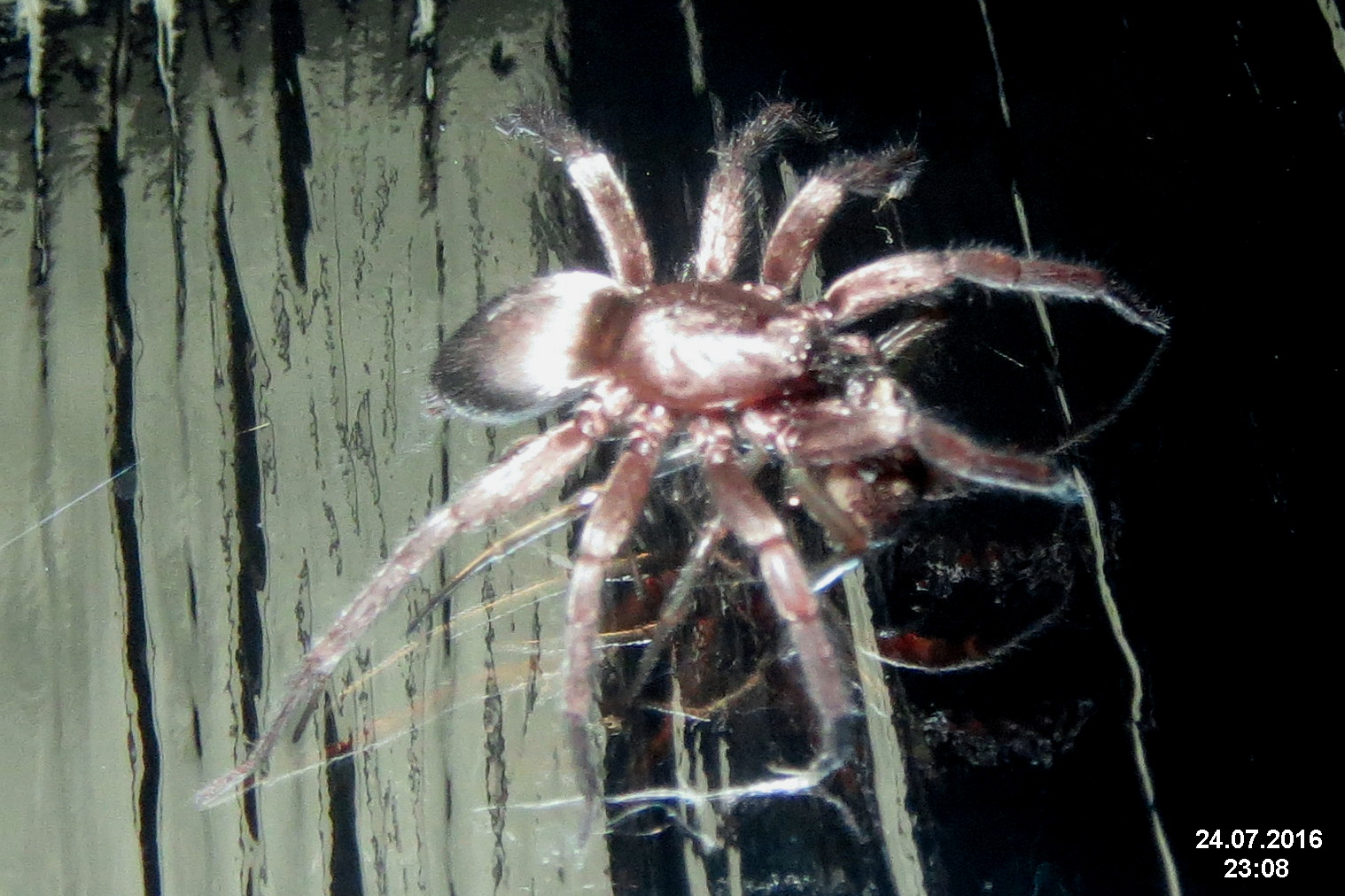 Scotophaeus blackwalli - skálovka Blackwallova.